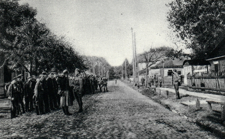 Zbiórka batalionu warszawskiego Polskiej Organizacji Wojskowej por. Tadeusza Żulińskiego w Kopyłowie (koło Kodnia), w dniu dołączenia do I Brygady Legionów Polskich.